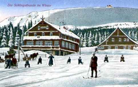 Nieistniejące schronisko im. B. Czecha (Schlingelbaude) w zimie